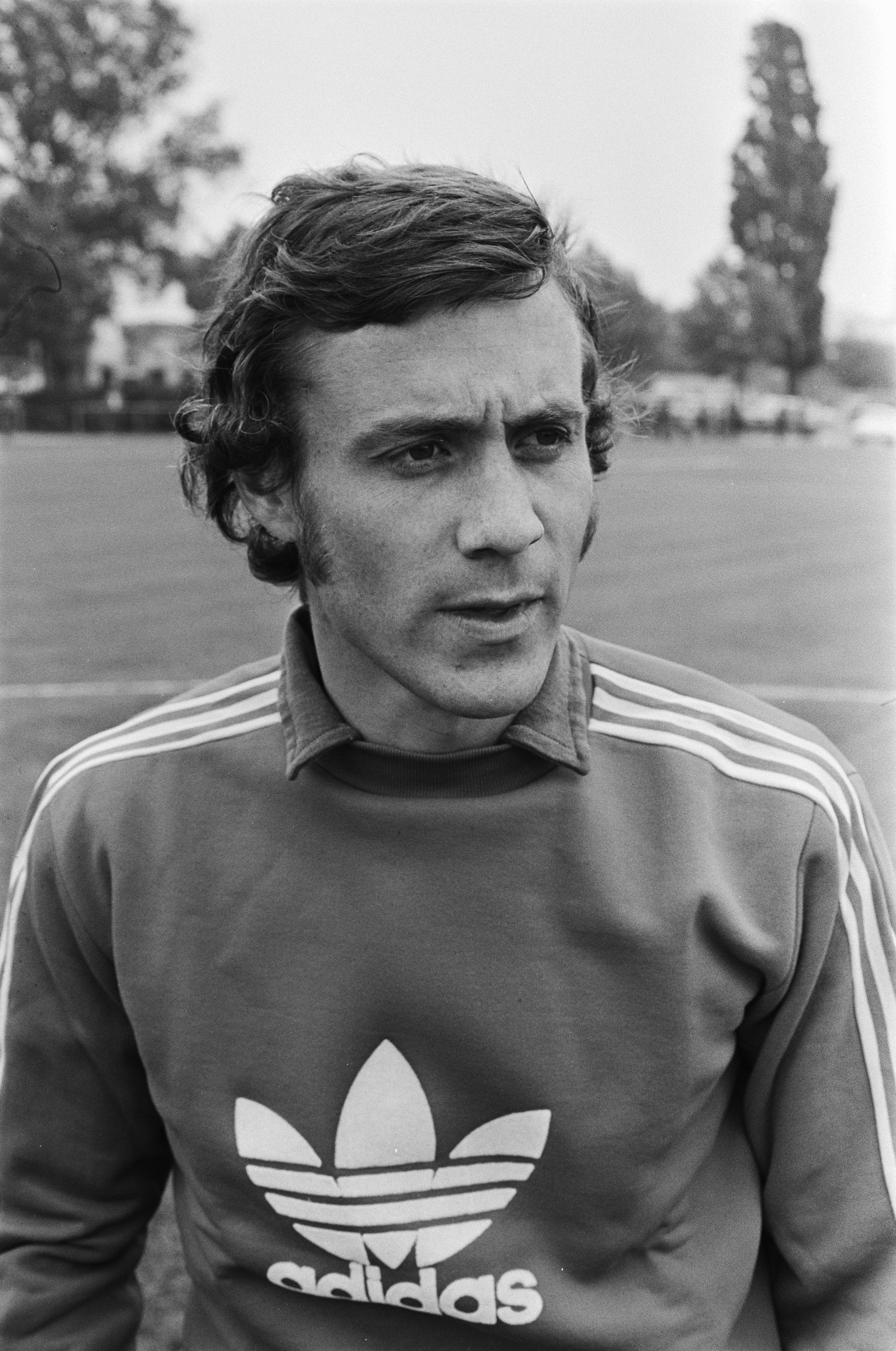 Collectie / Archief : Fotocollectie Anefo Reportage / Serie : [ onbekend ] Beschrijving : Selectie Zweedse elftal voor WK voetbal in trainingskamp in Mönchen Gladblach; nr. 16 Kindvall (kop), nr. 17 Hellstrom (kop), nr. 18 Edstrom (kop) Datum : 11 juni 1974 Trefwoorden : TRAININGEN, sport, voetbal Persoonsnaam : Kindvall, Ove Fotograaf : Verhoeff, Bert / Anefo, [onbekend] Auteursrechthebbende : Nationaal Archief Materiaalsoort : Negatief (zwart/wit) Nummer archiefinventaris : bekijk toegang 2.24.01.05 Bestanddeelnummer : 927-2498